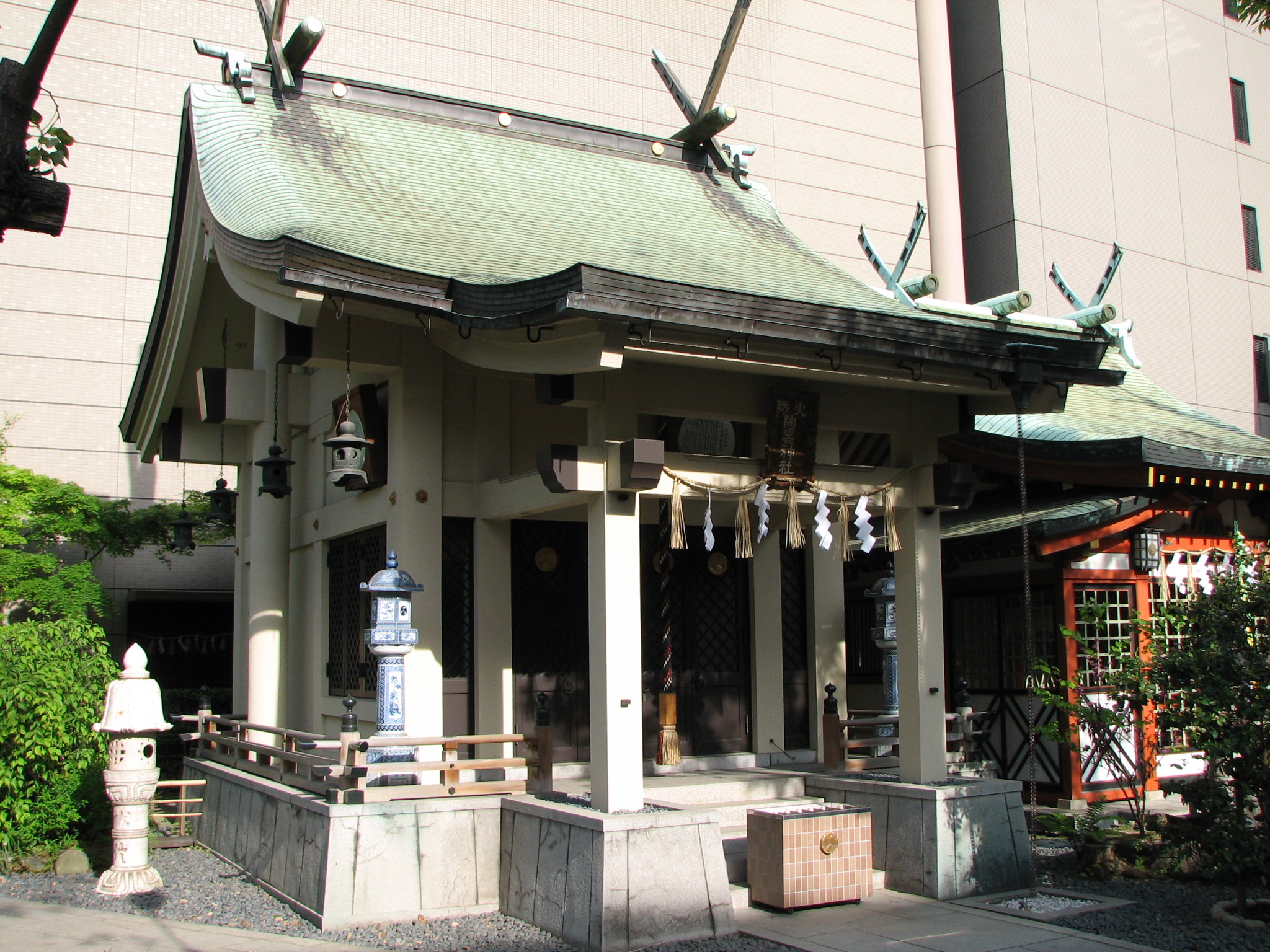 Toki (pottery) Shrine, Chuo, Osaka, Japan 坐摩神社境内 陶器神社（大阪市中央区）